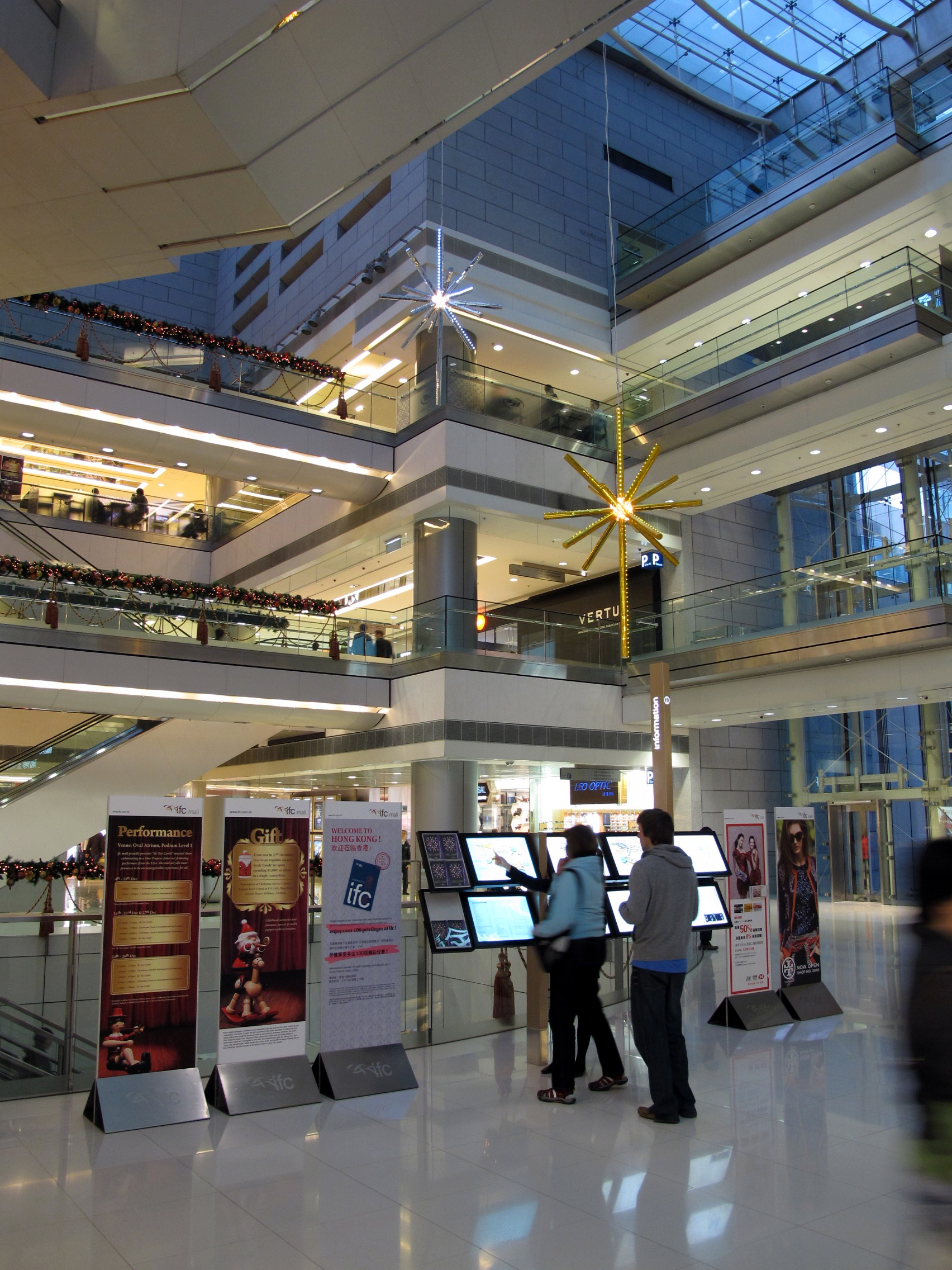 IFC mall Phase 1 Void